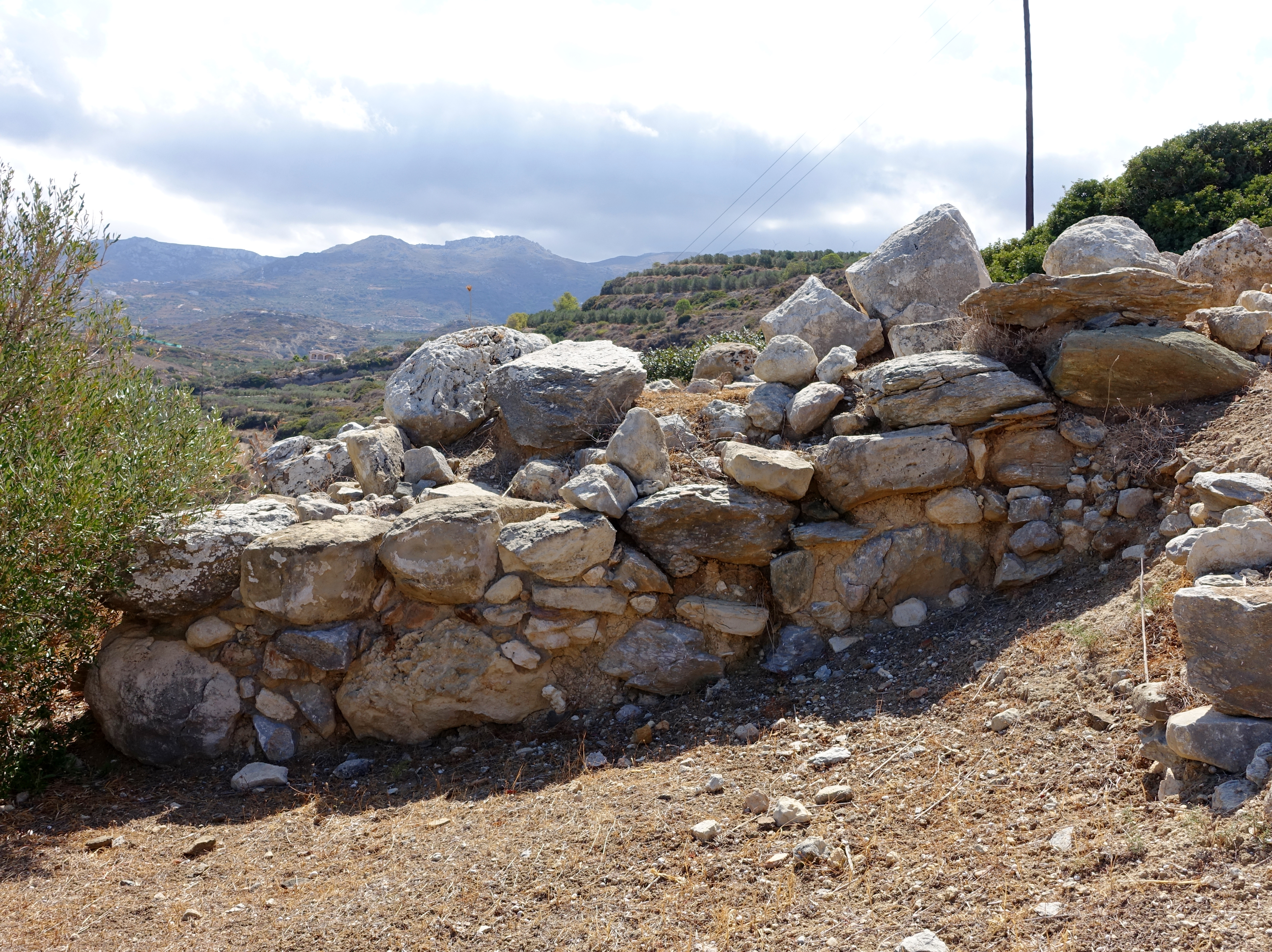 Minoische Ausgrabungsstätte von Petras (Πετράς), Gemeinde Sitia, Kreta, Griechenland